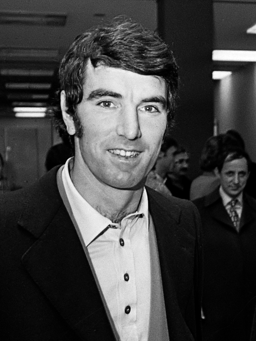 Elftal Juventus op Schiphol voor wedstrijd tegen Ajax (Europacup III ), trainer Parola (m) met doelman Zoff (l) en Altafini (r) 10 december 1974